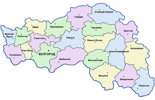 Карта Белгородской области